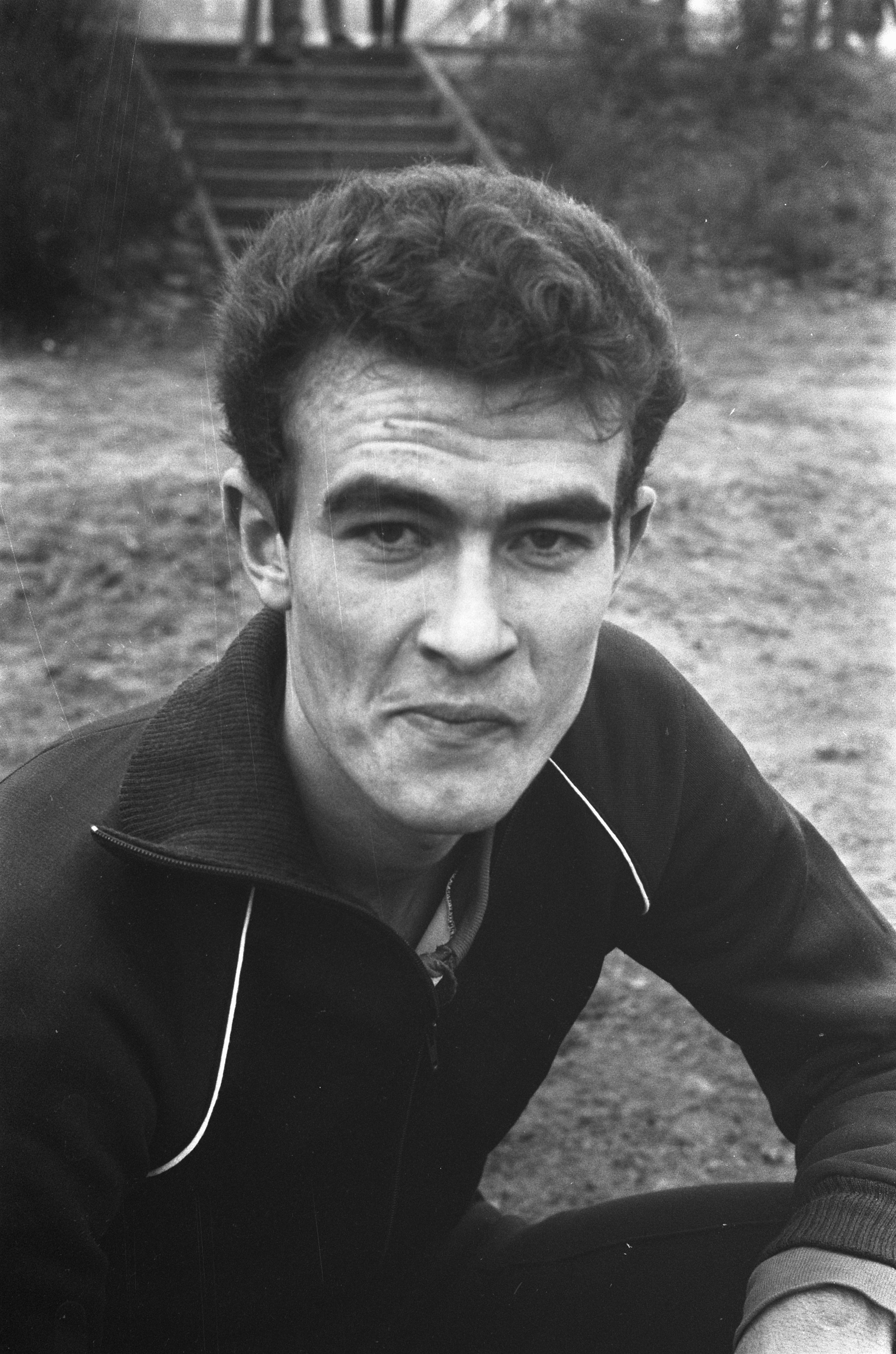 Photographie du footballeur Aad Koudijzer par Eric Koch / Anefo (Arnhem, 1968).